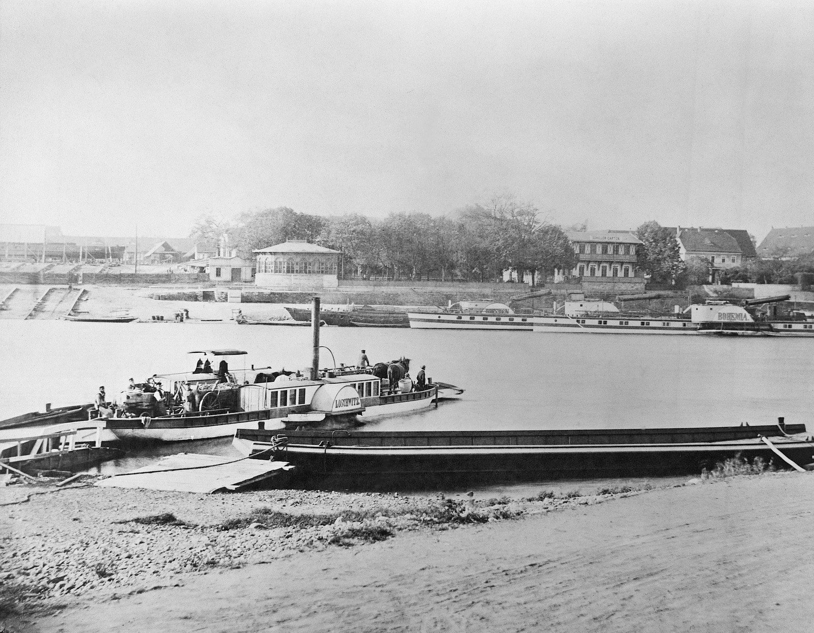 Schillergarten, Werft Blasewitz, Raddampfer